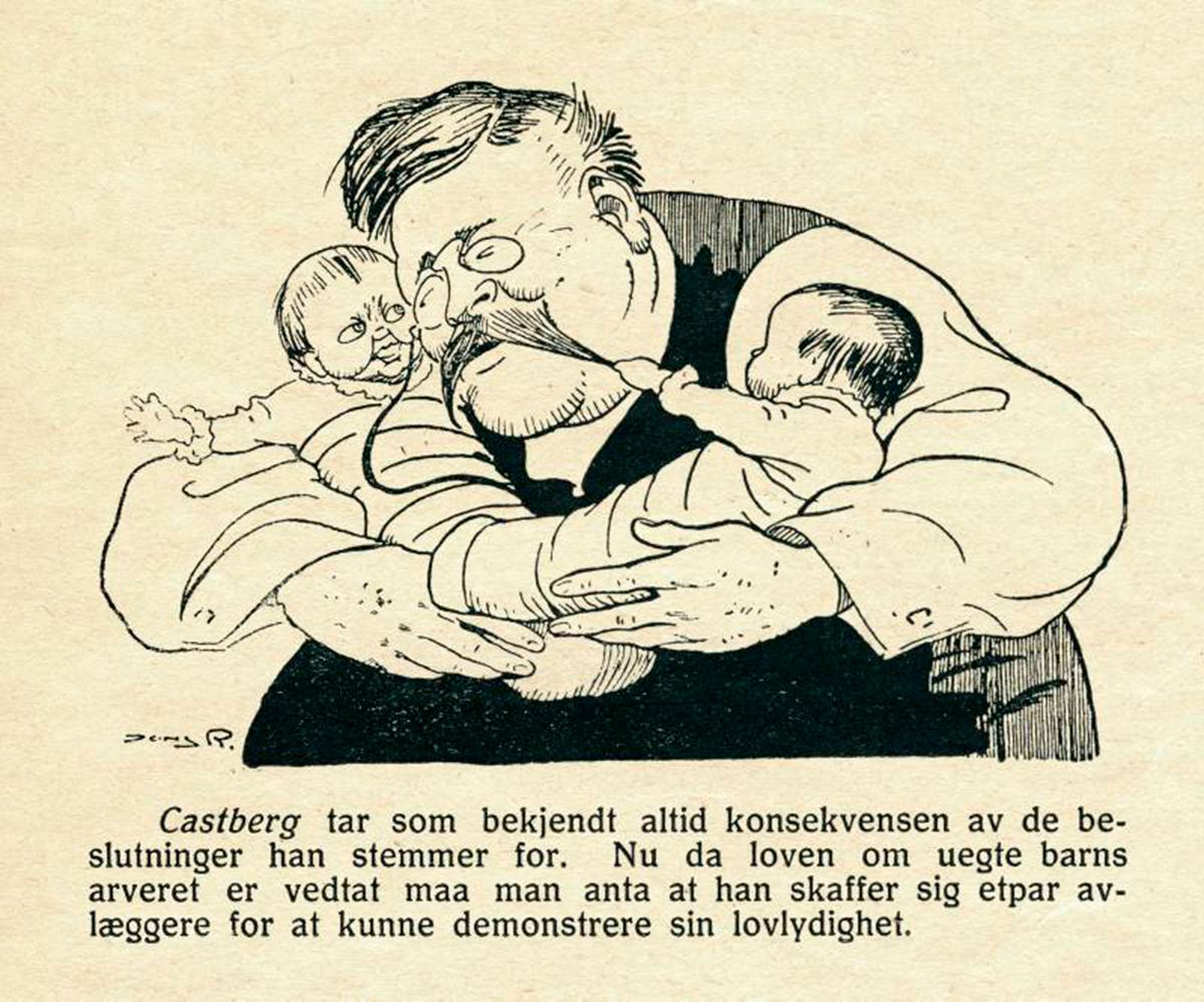 Johan Castberg, mannen bak de Castbergske barnelover, som sikret utenomektekskapelige barn arverett til sine fedre, karikert i vittighetsbladet Hvepsen, 1915.